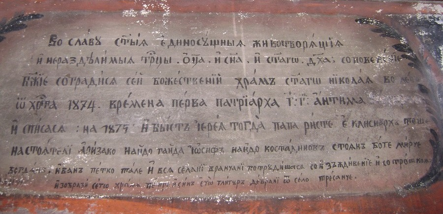 Натпис над влезот во црквата „Св. Никола“ во прилепско Вранче